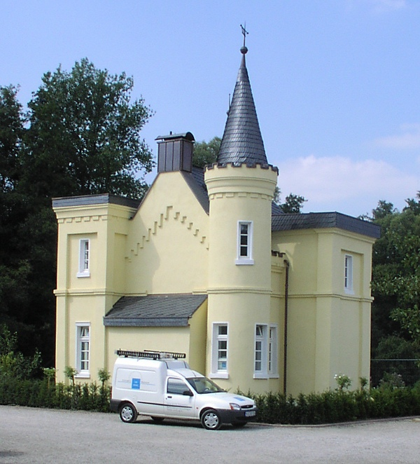 Insel-Schlösschen am Hariksee (fotografiert am 25.08.2003).